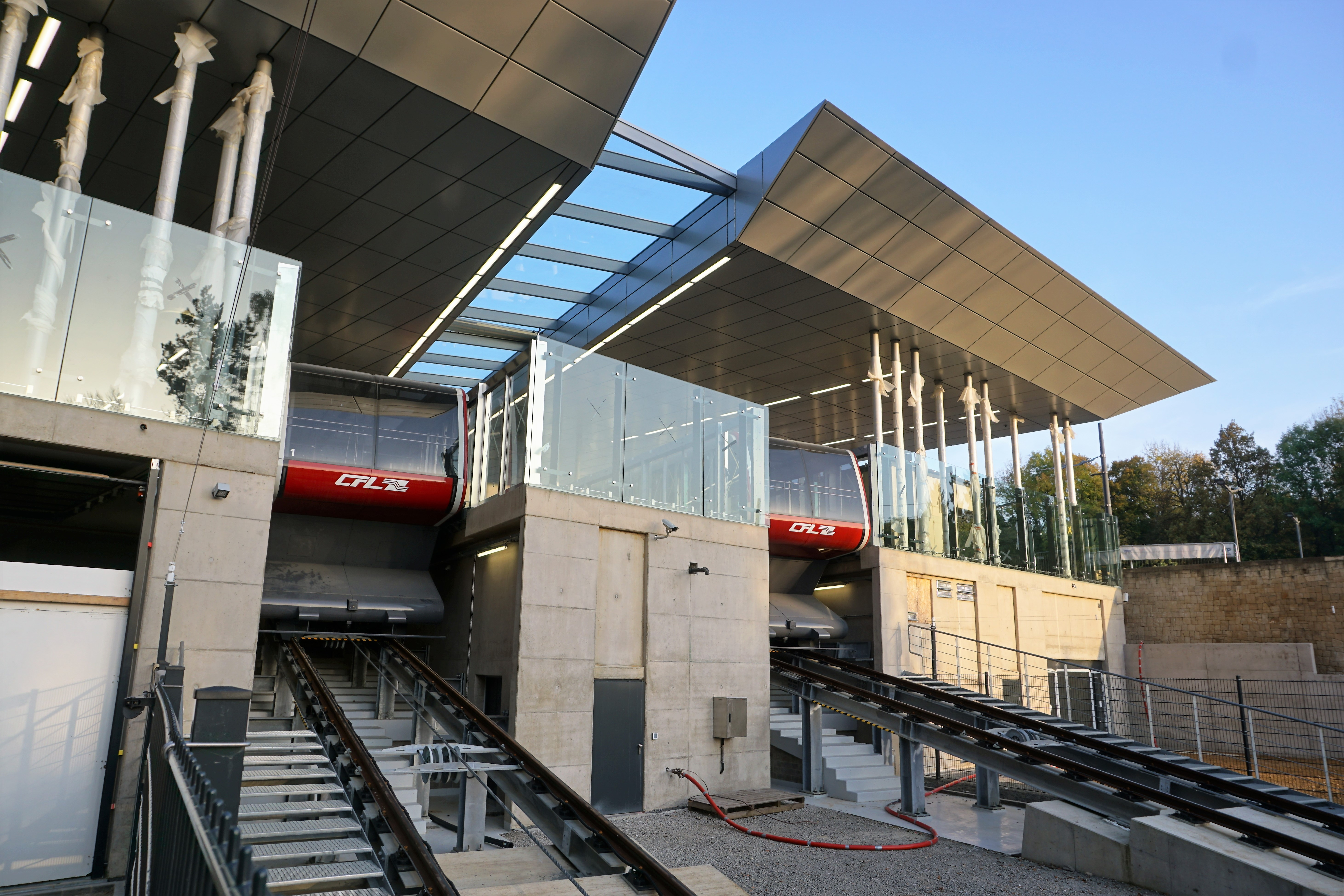 Luxembourg, construction du double-funiculaire Pfaffenthal - Kirchberg. Deux cabines en station amont.